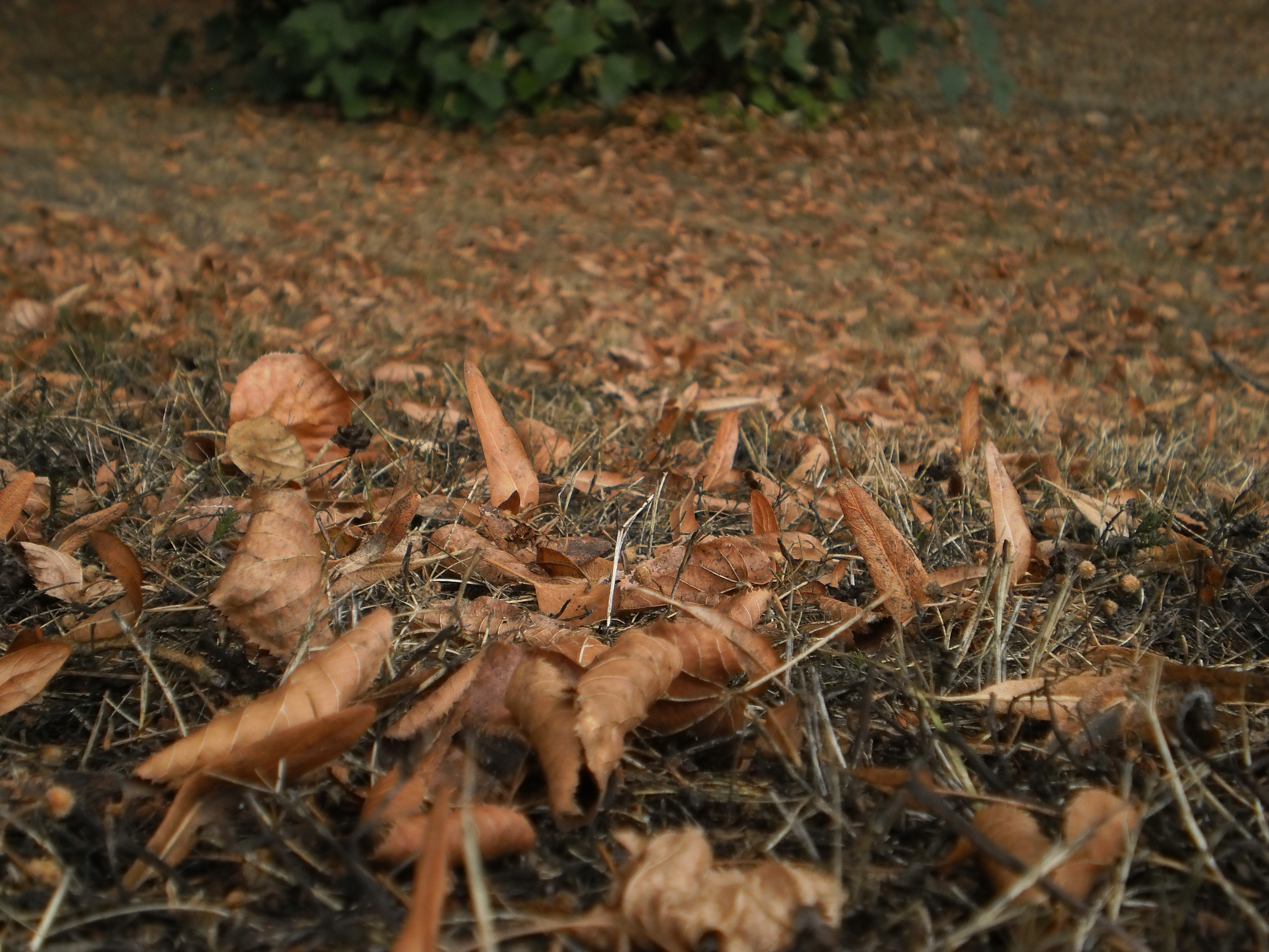 Trockenes Gras und Laub durch Laubfall nach Trockenheit im Juni, Juli und August 2018, Getrocknete Blätter unter den Linden (Tilia cordata oder Krimlinden Tilia × euchlora?) in Marburg im Ludwig-Schüler-Park, (photo 2018-08-14 in Germany).